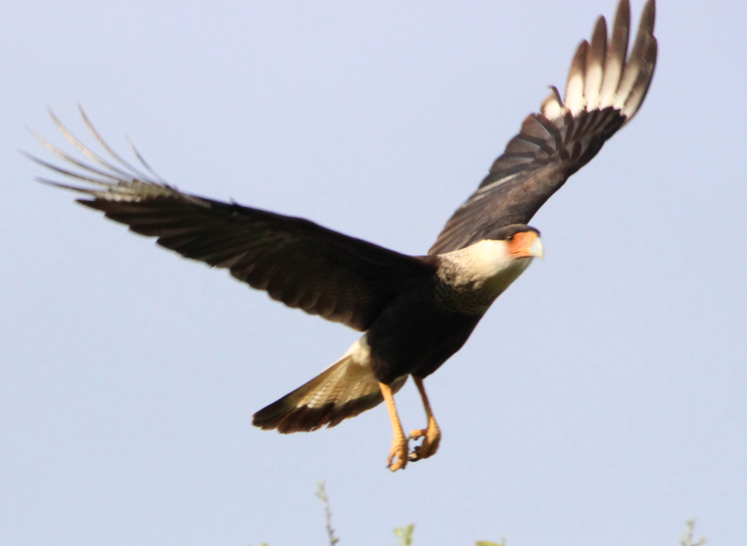 Caracara cheriway volando en Ciudad Victoria Tamaulipas México